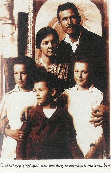 Քանդակագործ Յենո Բորին իր ընտանիքի հետ